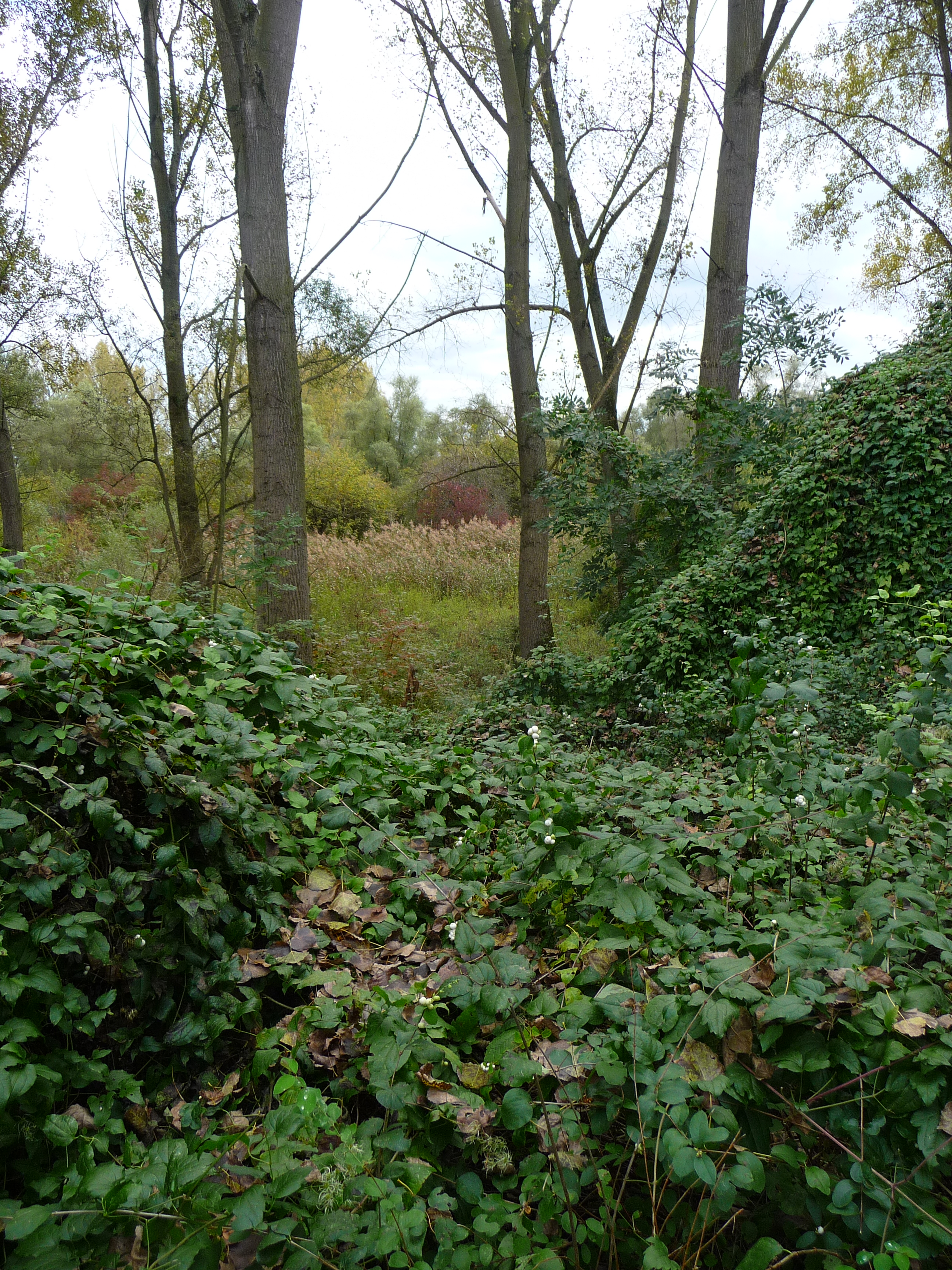 Naturschutzgebiet Kühkopf-Jakobsaue (Kreis Groß-Gerau, Hessen, Deutschland)